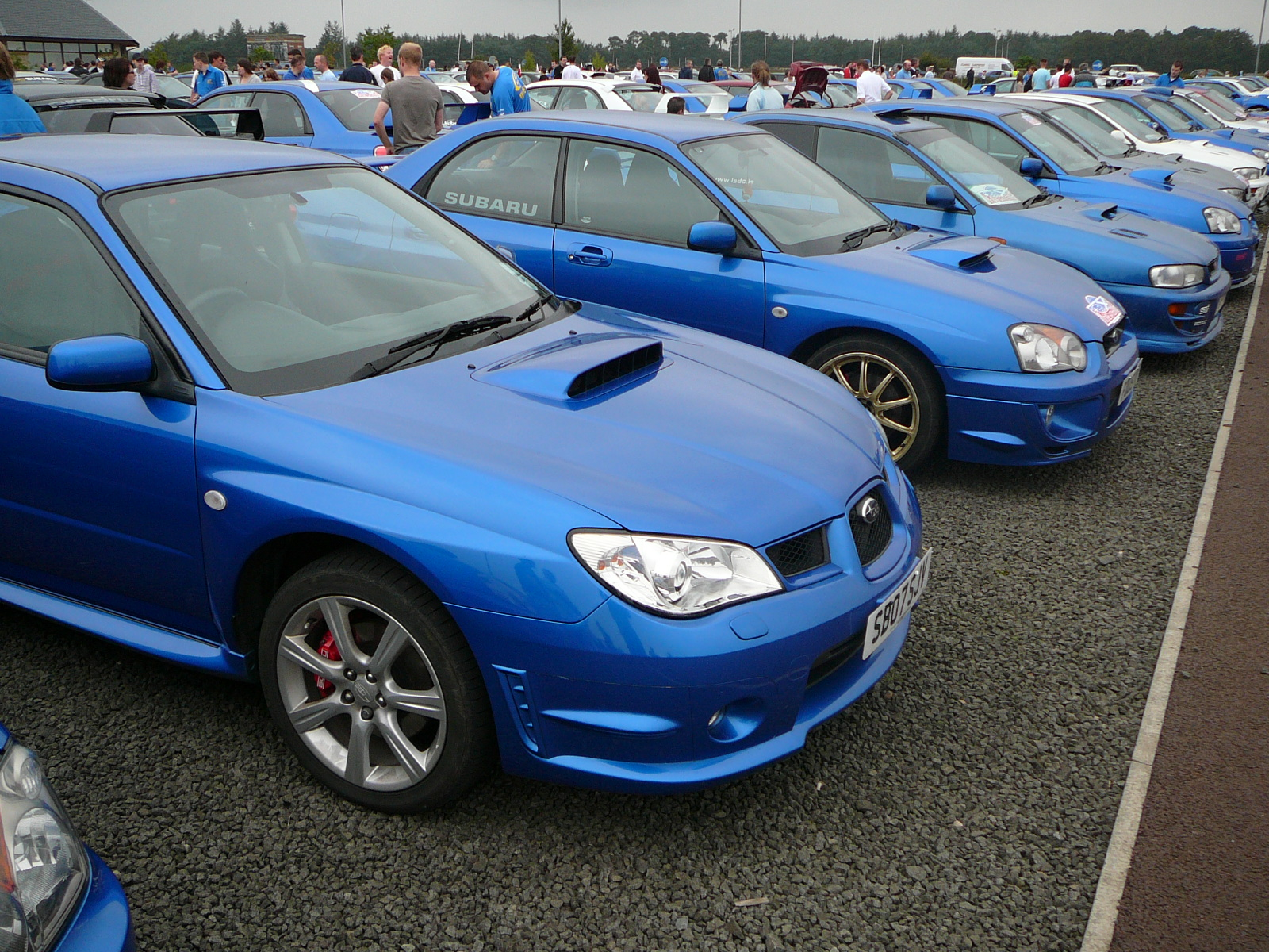 A blue Impreza anyone?